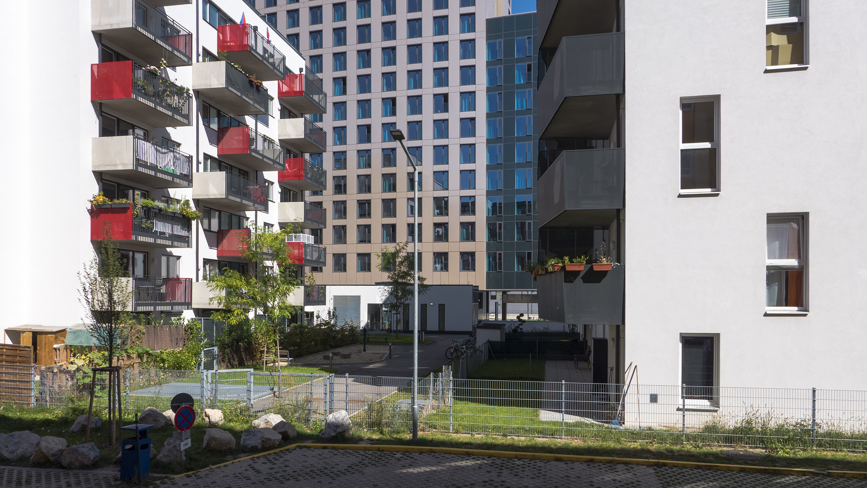 Sonnwendviertel in Wien 10 bei der Rieplstraße